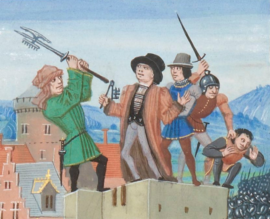 Assassinat d'Étienne Marcel par Jean Maillard, le 31 juillet 1358. Jean Froissart, Chroniques, Flandre, Bruges, XVe s., folio 230, recto (BNF, ms. Français 2643).